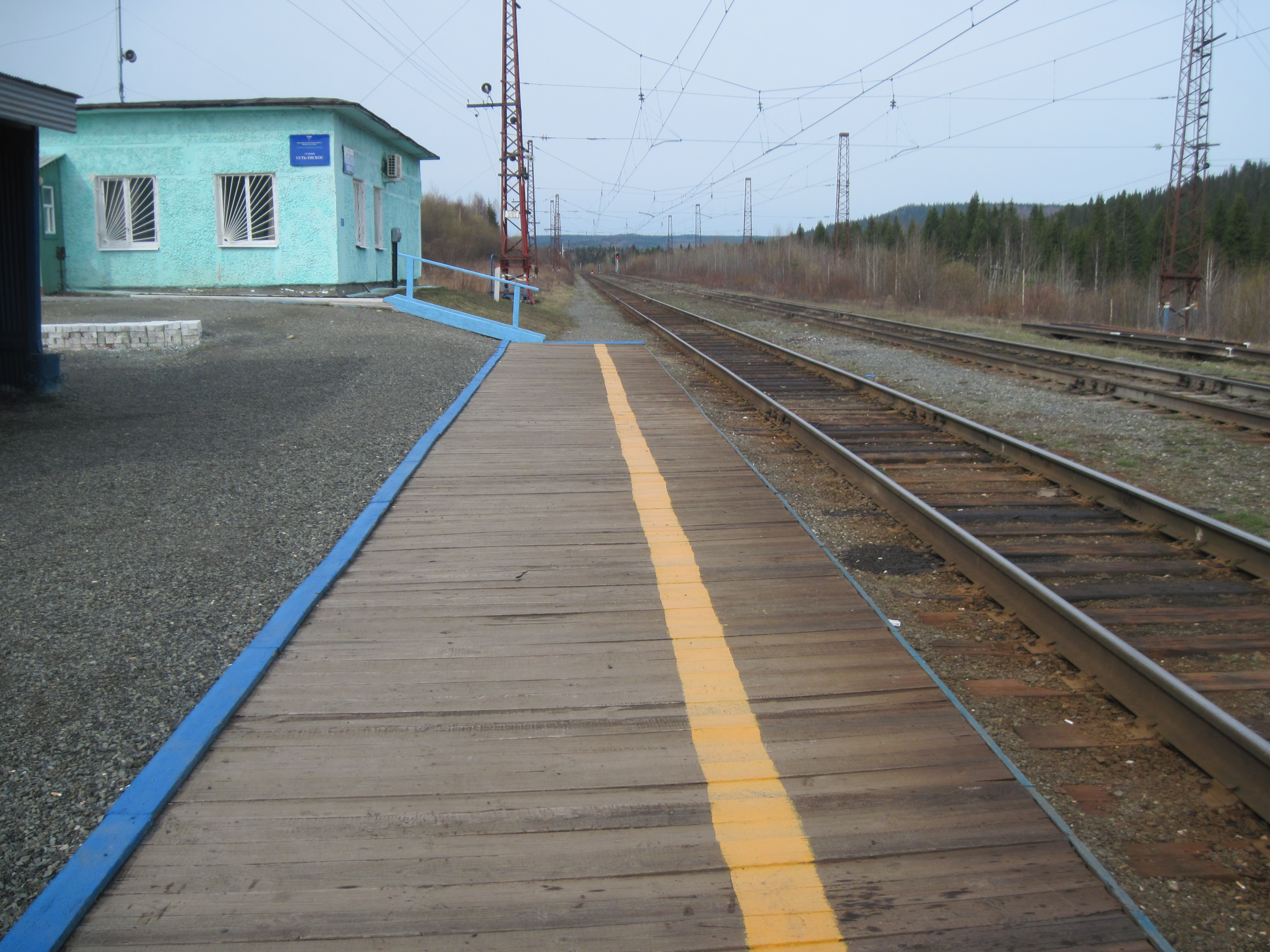 Пермский край.